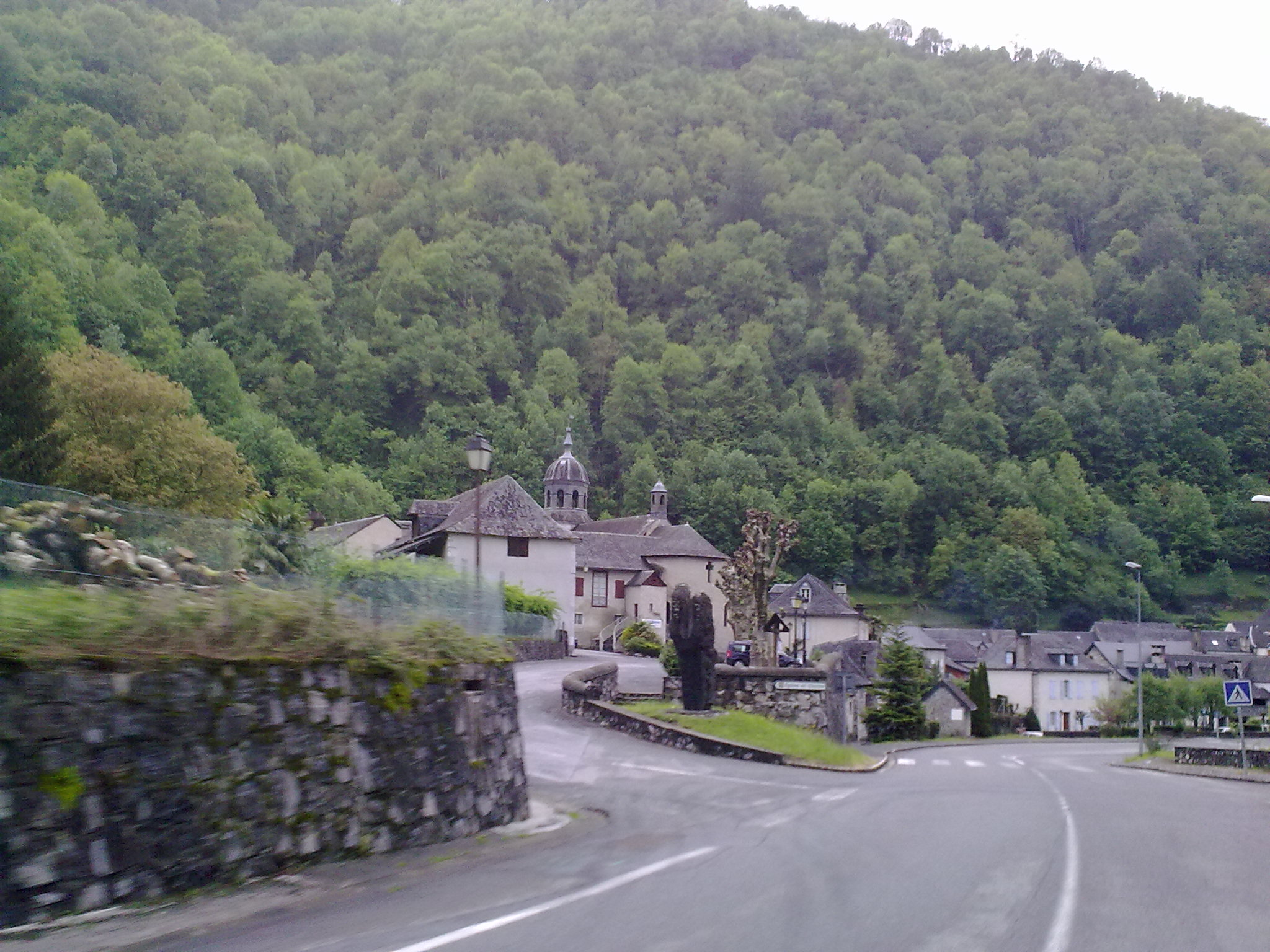 Sarrance, France